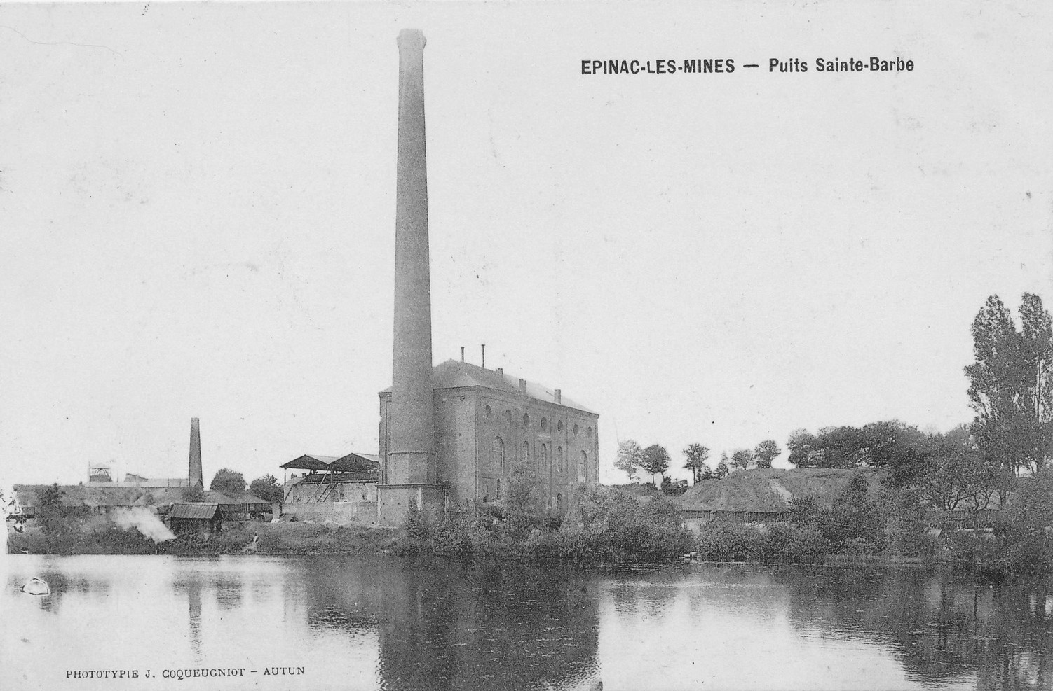 Le puits Sainte-Barbe (Houillères d’Épinac, France).